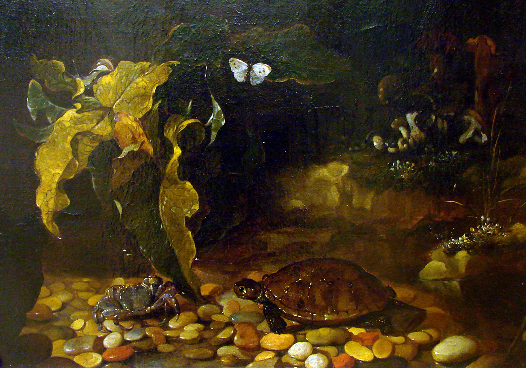 detail